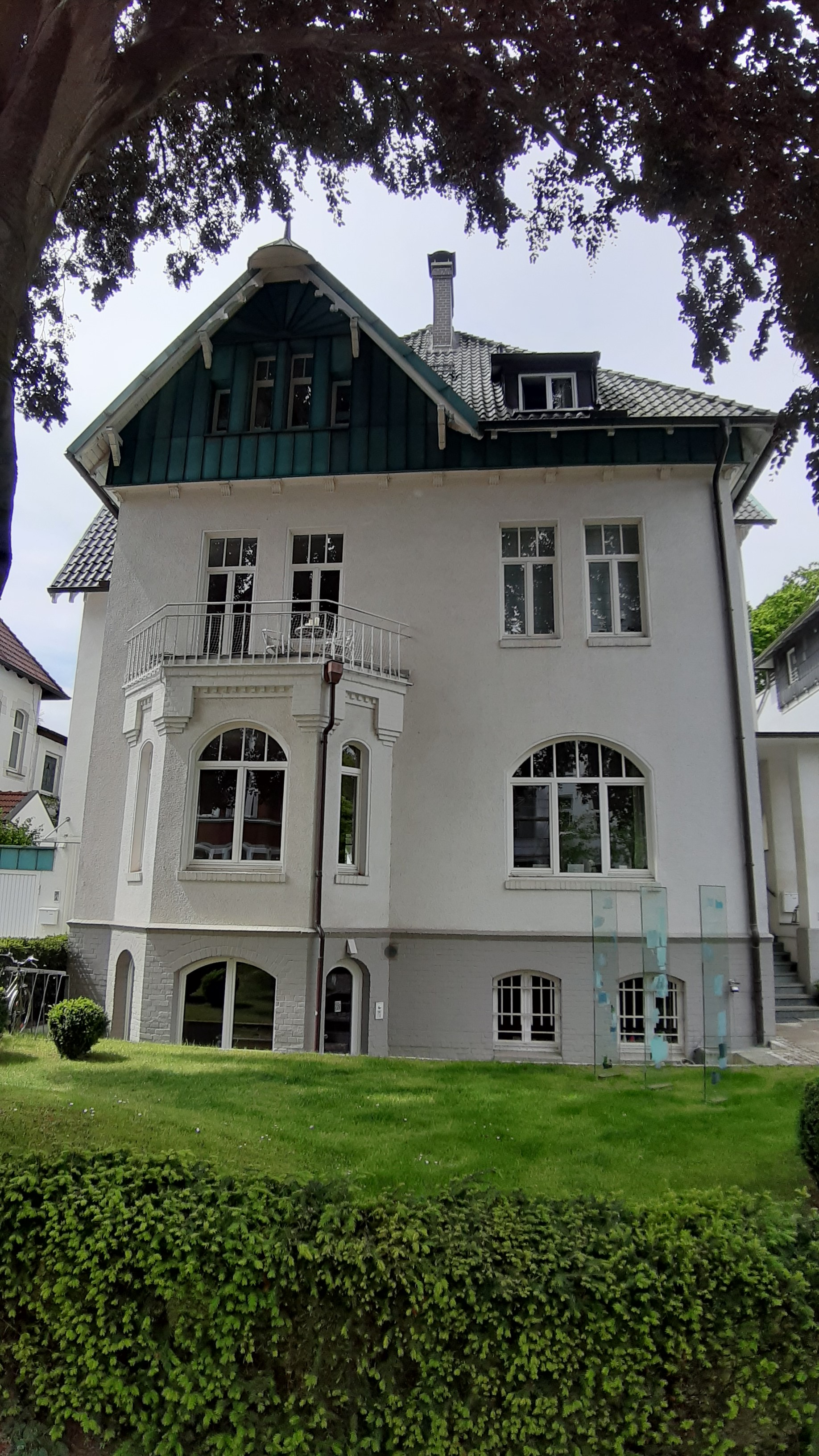 Die 1910 von Hermann Brune erbaute und fortan von ihm bis zu seinem Tod 1922 bewohnte Villa in Hannover-Waldhausen, Güntherstraße 31/31A. Nach einer Entkernung befinden sich heute in der Villa diverse Luxus-Mietwohnungen.